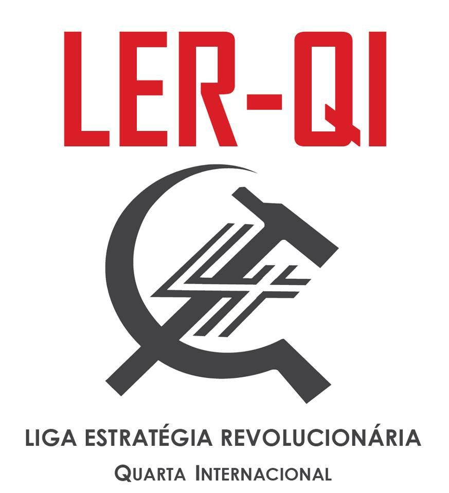 Velho logo da LER-QI do Brasil.